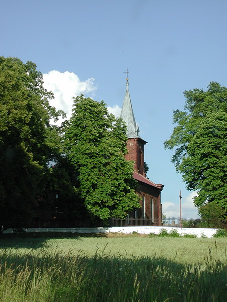 Kościół św. Marcina w Górce Pabianickiej